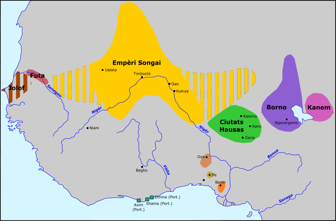 Africa de l'Oèst durant lo periòde songai.